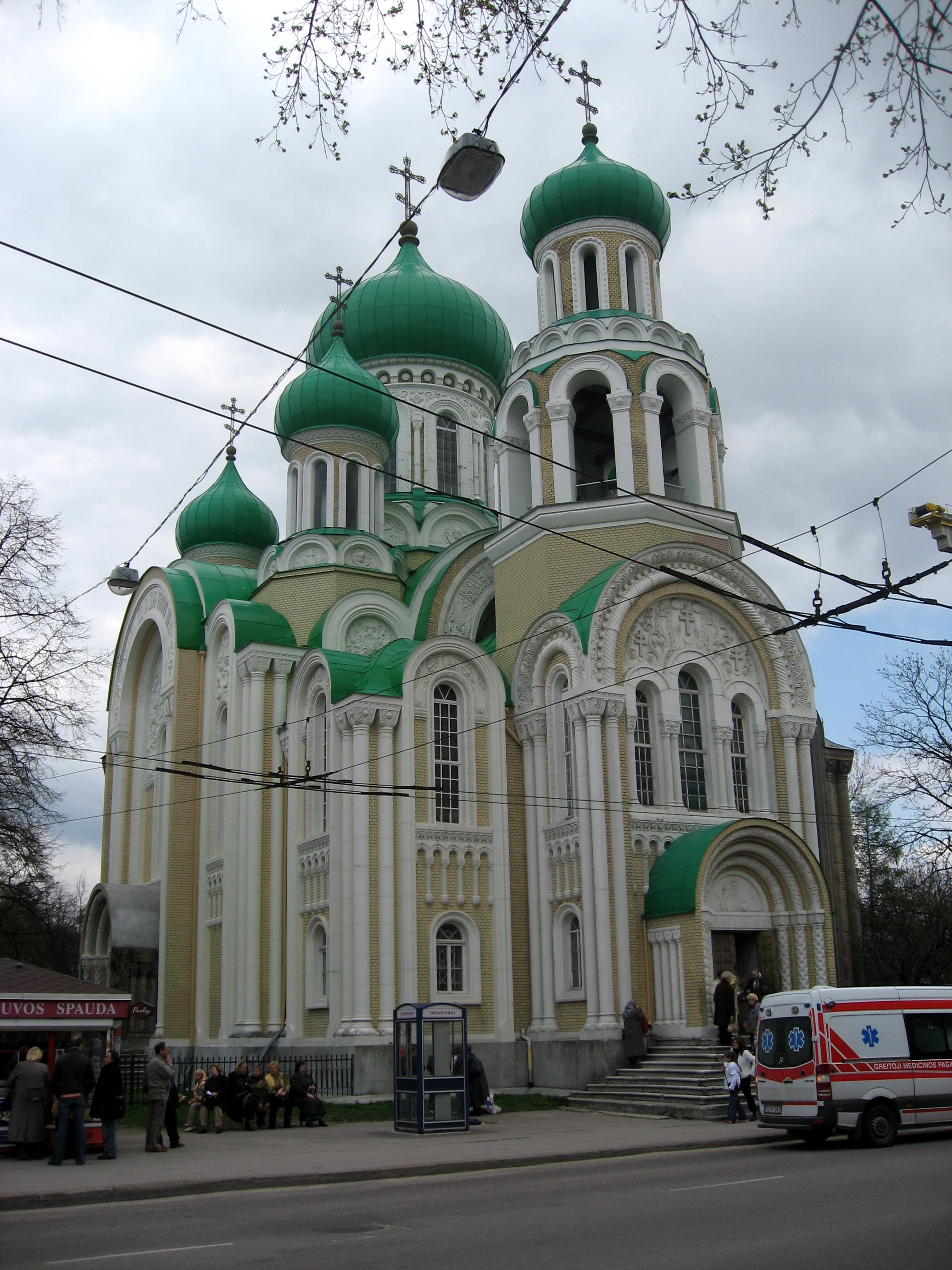 Vilnius, pravoslavný kostel